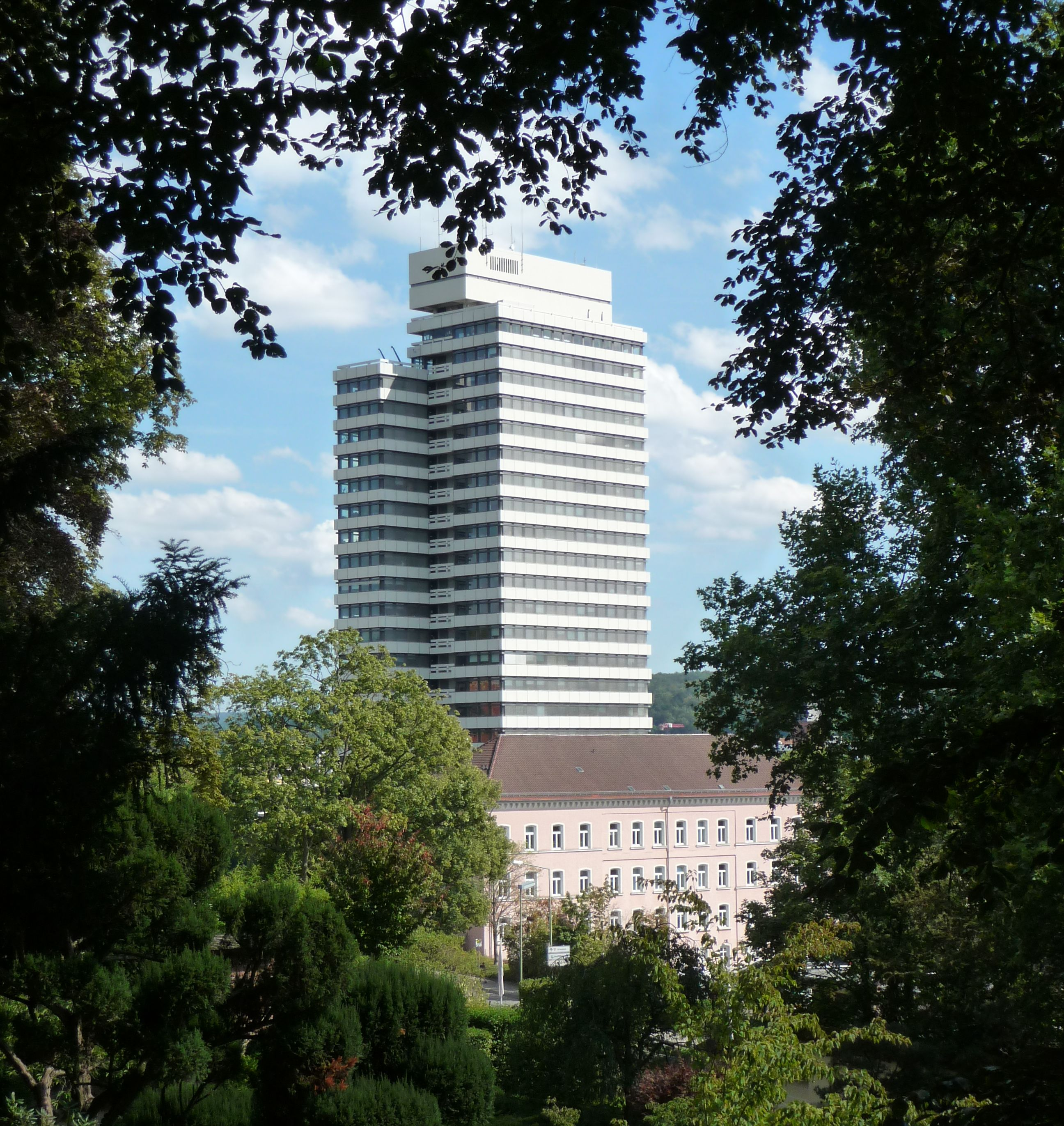 Rathaus